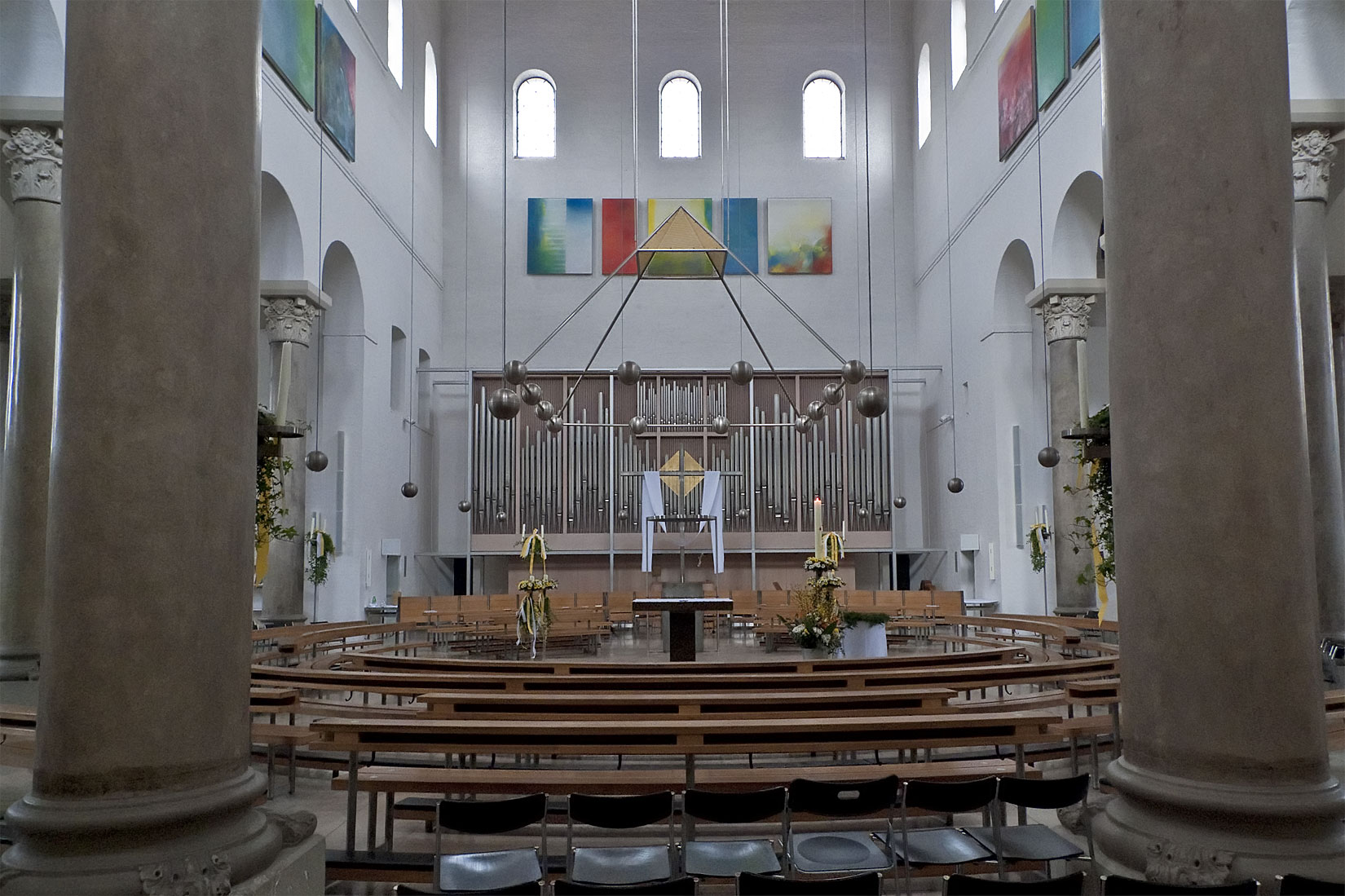 St.-Bonifaz-München-Innen